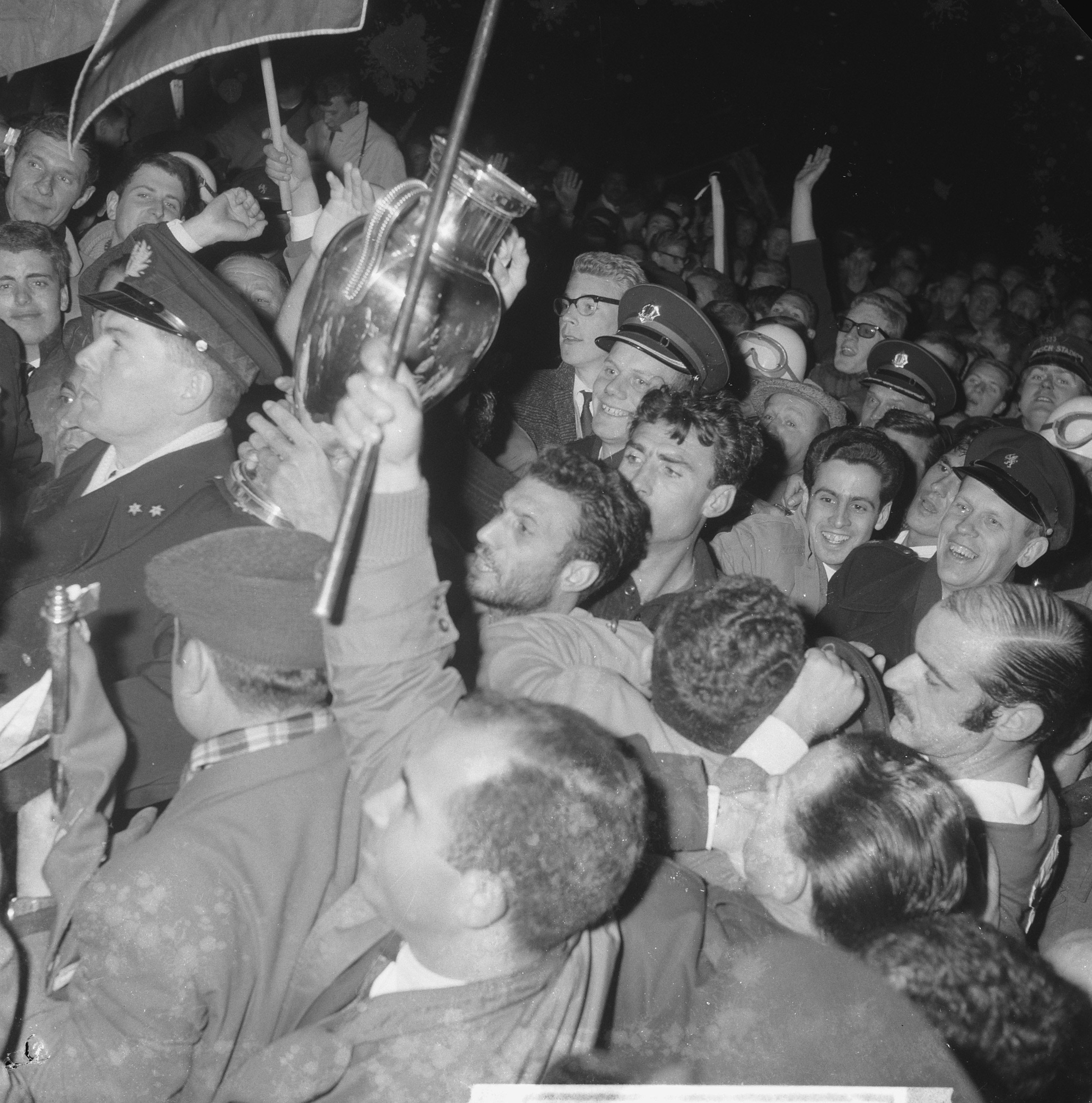 Collectie / Archief : Fotocollectie Anefo Reportage / Serie : [ onbekend ] Beschrijving : Benfica tegen Real Madrid 5-3 huldiging met beker Datum : 2 mei 1962 Trefwoorden : bekers, huldigingen, sport, voetbal Instellingsnaam : Real Madrid Fotograaf : Nijs, Jac. de / Anefo Auteursrechthebbende : Nationaal Archief Materiaalsoort : Negatief (zwart/wit) Nummer archiefinventaris : bekijk toegang 2.24.01.03 Bestanddeelnummer : 913-8523